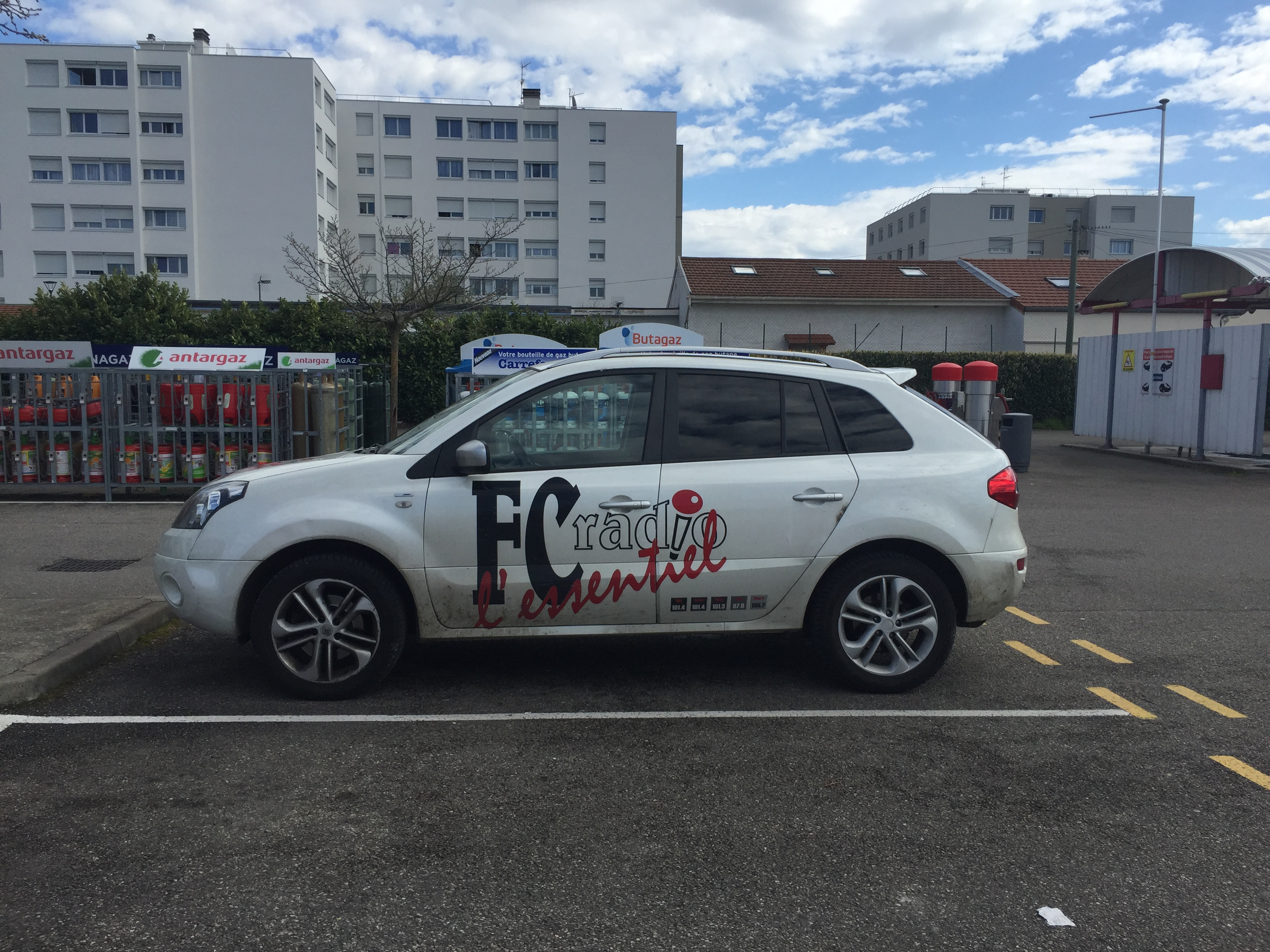 Voiture FC (Fréquence Côtière) - FC Radio sur le parking de Carrefour market Miribel.